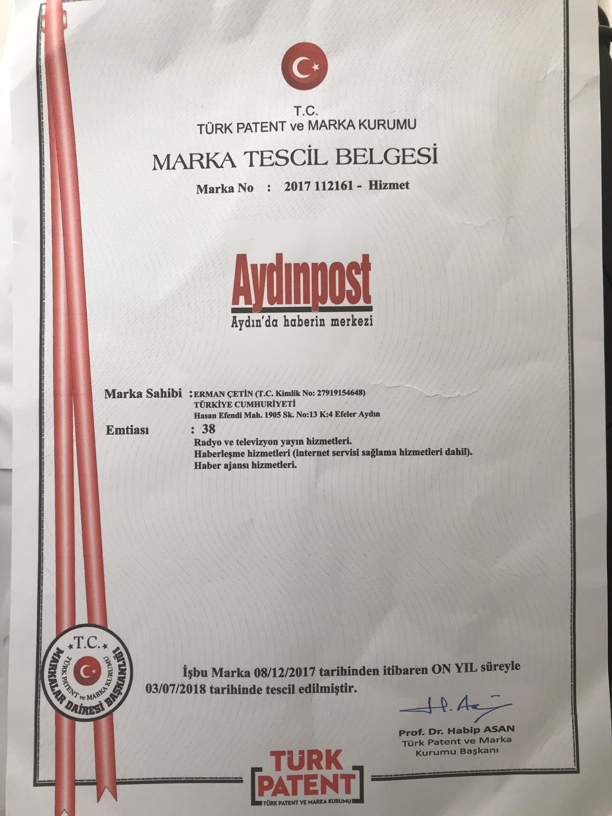 خبر آيدن